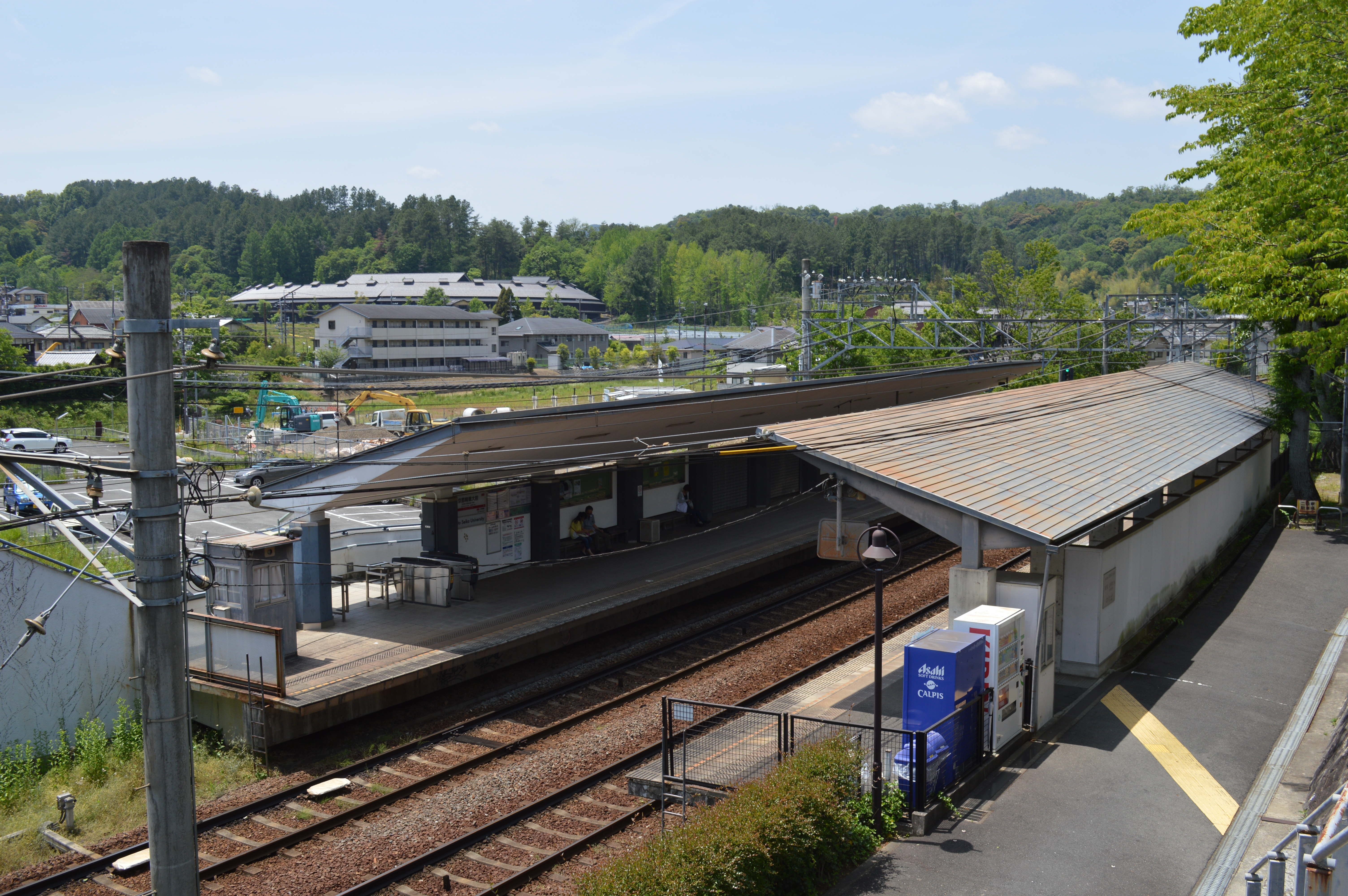 京都市左京区岩倉 叡山電鉄鞍馬線京都精華大前駅 パラディオ橋北側より